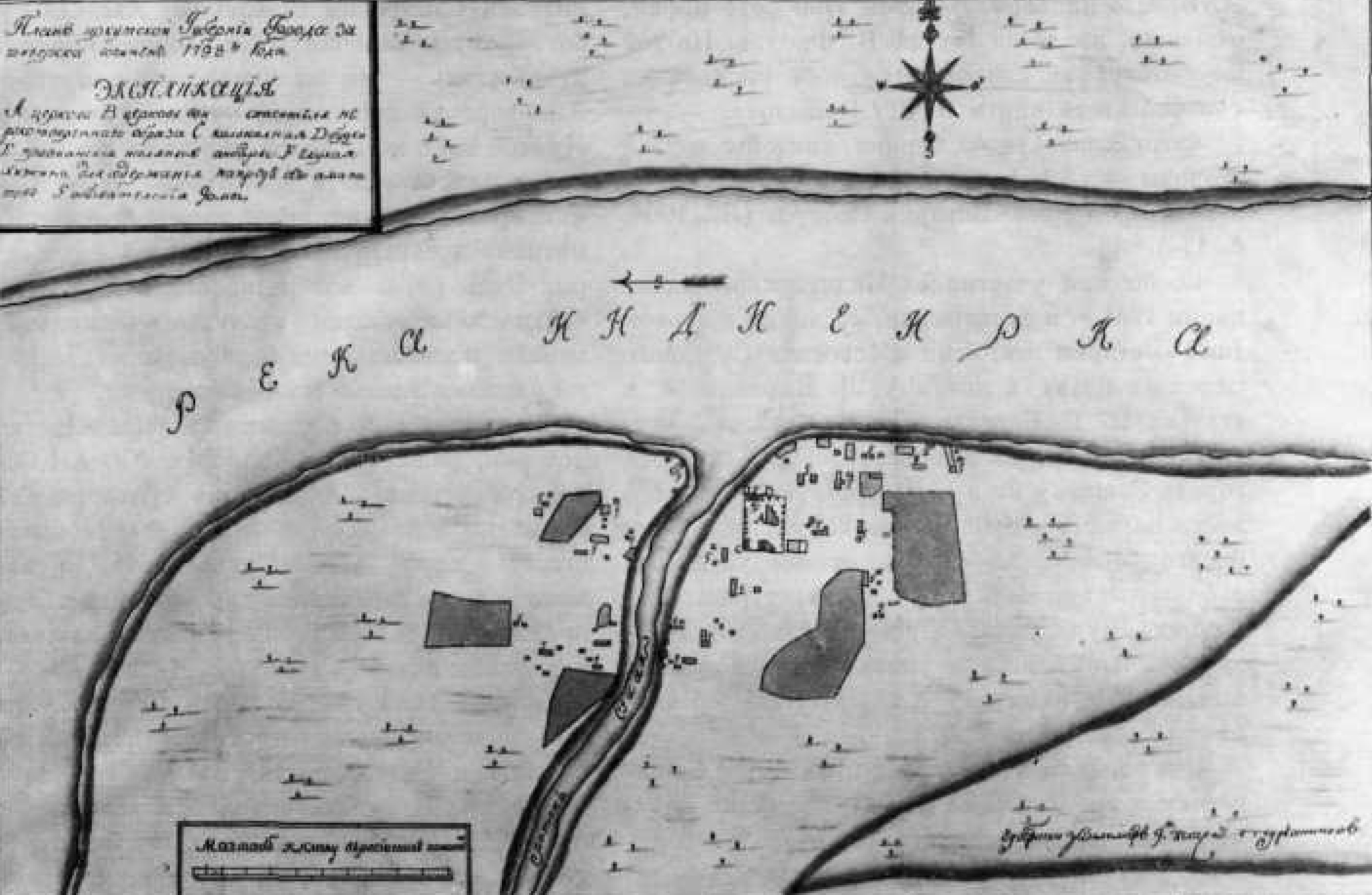 План города Зашиверска, сочиненный в 1798 г. губернским землемером 9-го класса Турчаниновым, Фрагмент плана